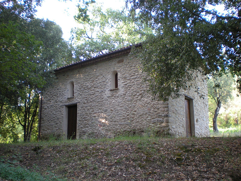 Cappella della Vergine del Principio sita in Mandia di Ascea (SA)